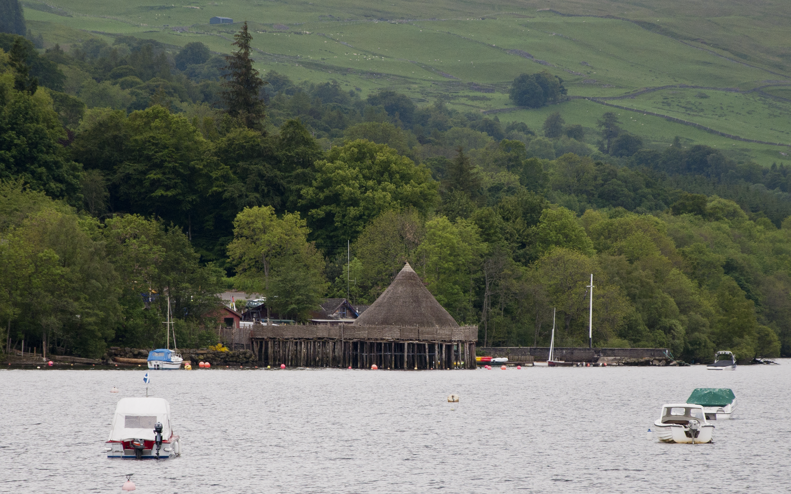 The Scottish Crannog Centre aan Loch Tay, Schotland